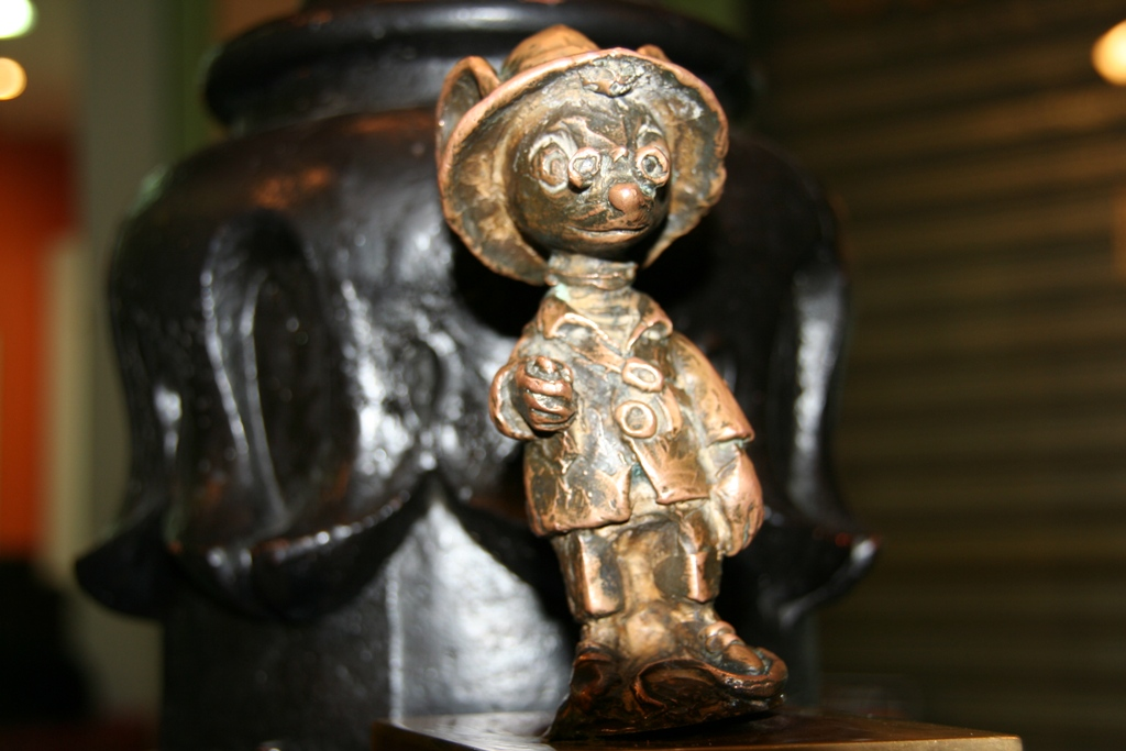 Figurita en bronce del Ratón Perez, cuya autora es la ilustradora Cruz Pintor, se encuentra ubicada en el lugar donde el Padre Coloma situó la vivienda del Ratoncito Pérez en la Calle Arenal número 8 de Madrid